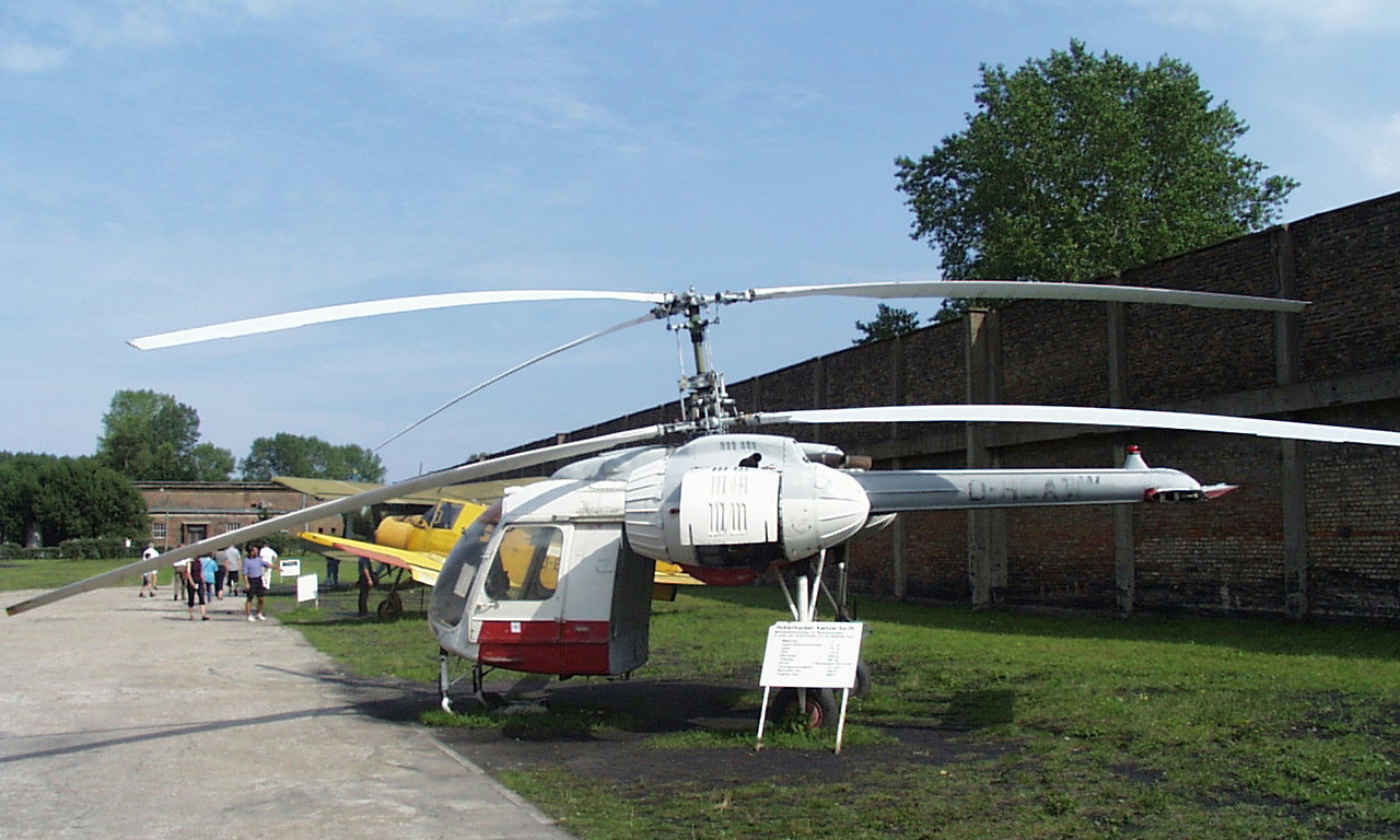 Ein Hubschrauber Kamow Ka-26 D-HOAW (SN:7001404)